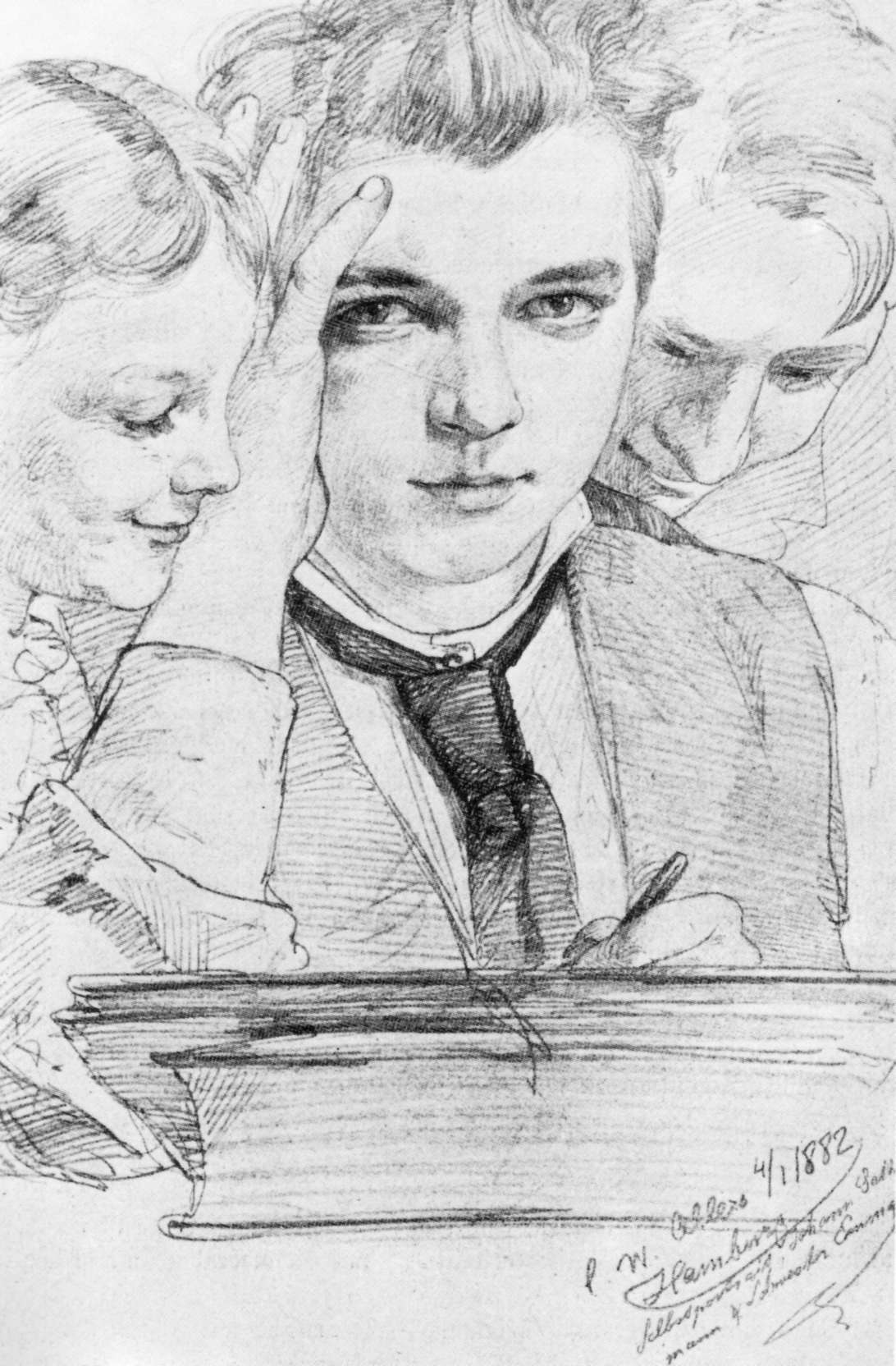 Self-portrait.